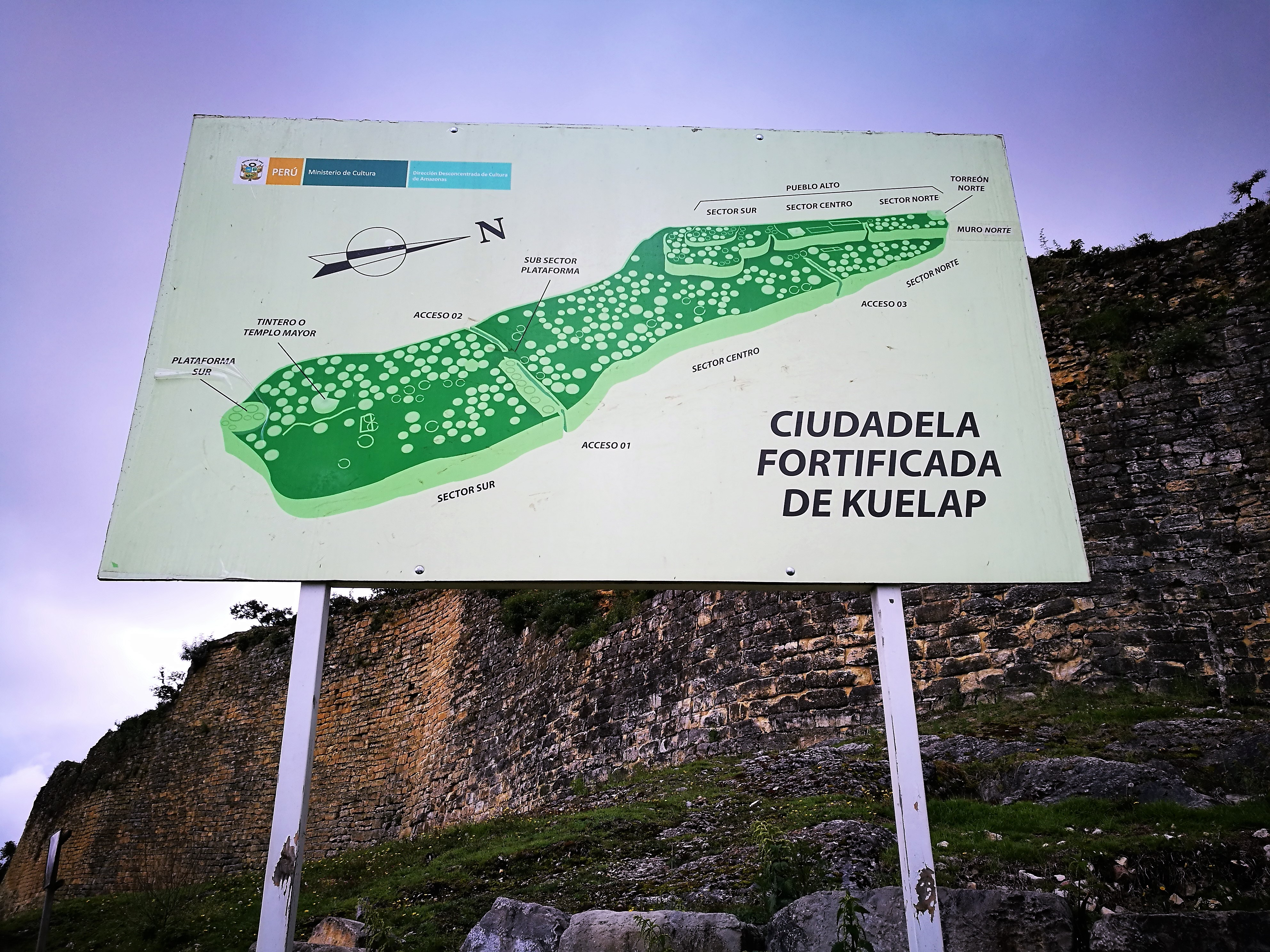 Plànol de la Ciutadella de Kuelap